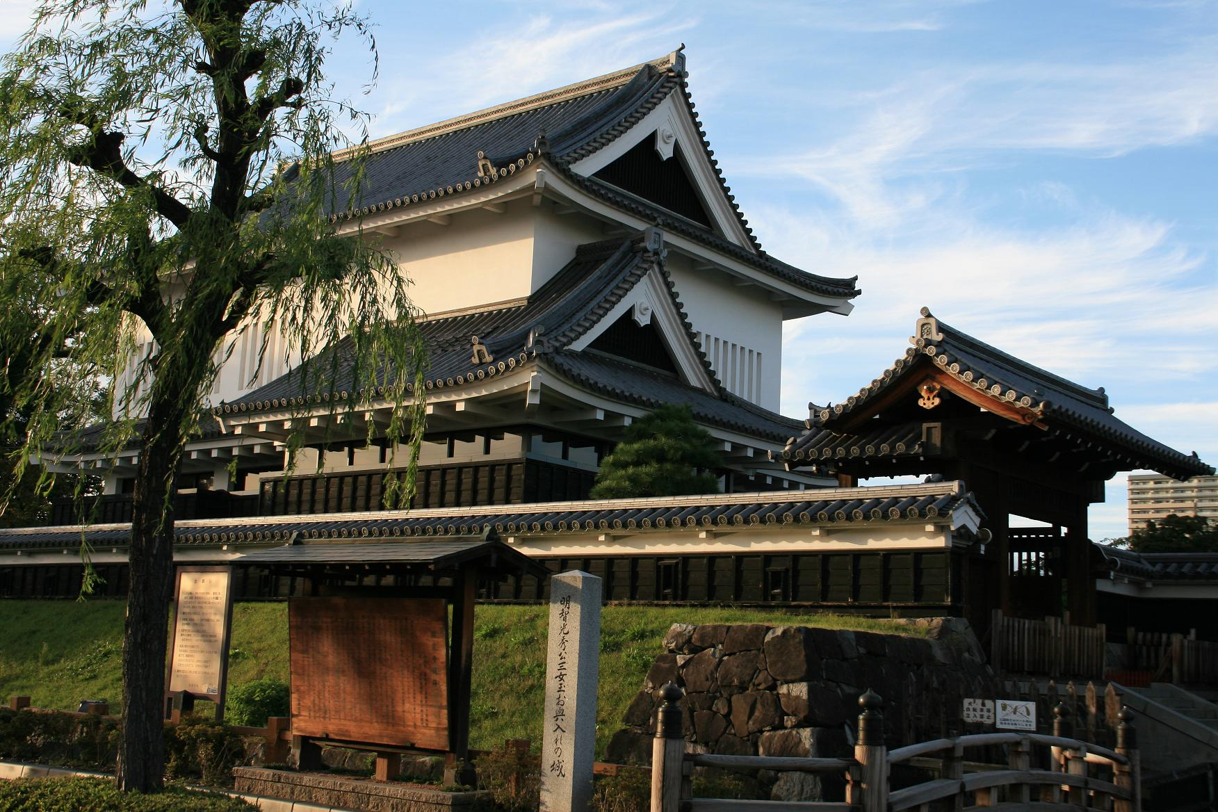 勝竜寺城の秋